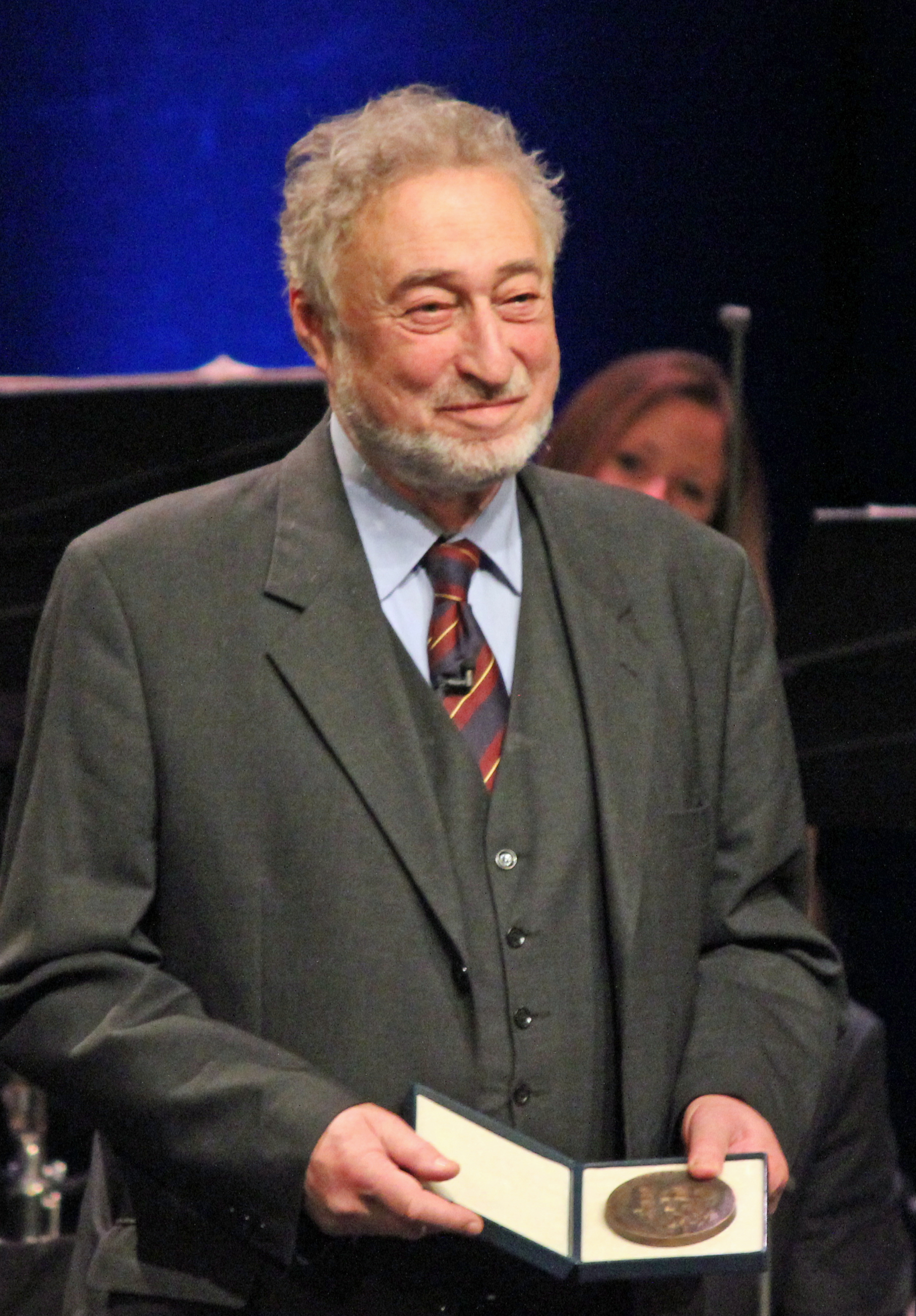 Zentraler Festakt im Theater am Aegi zur Eröffnung der Woche der Brüderlichkeit 2016 in Hannover. Veranstalter: Deutscher Koordinierungsrat der Gesellschaften für Christlich-Jüdische Zusammenarbeit. Verleihung der Buber-Rosenzweig-Medaille an Prof. Dr. Micha Brumlik.